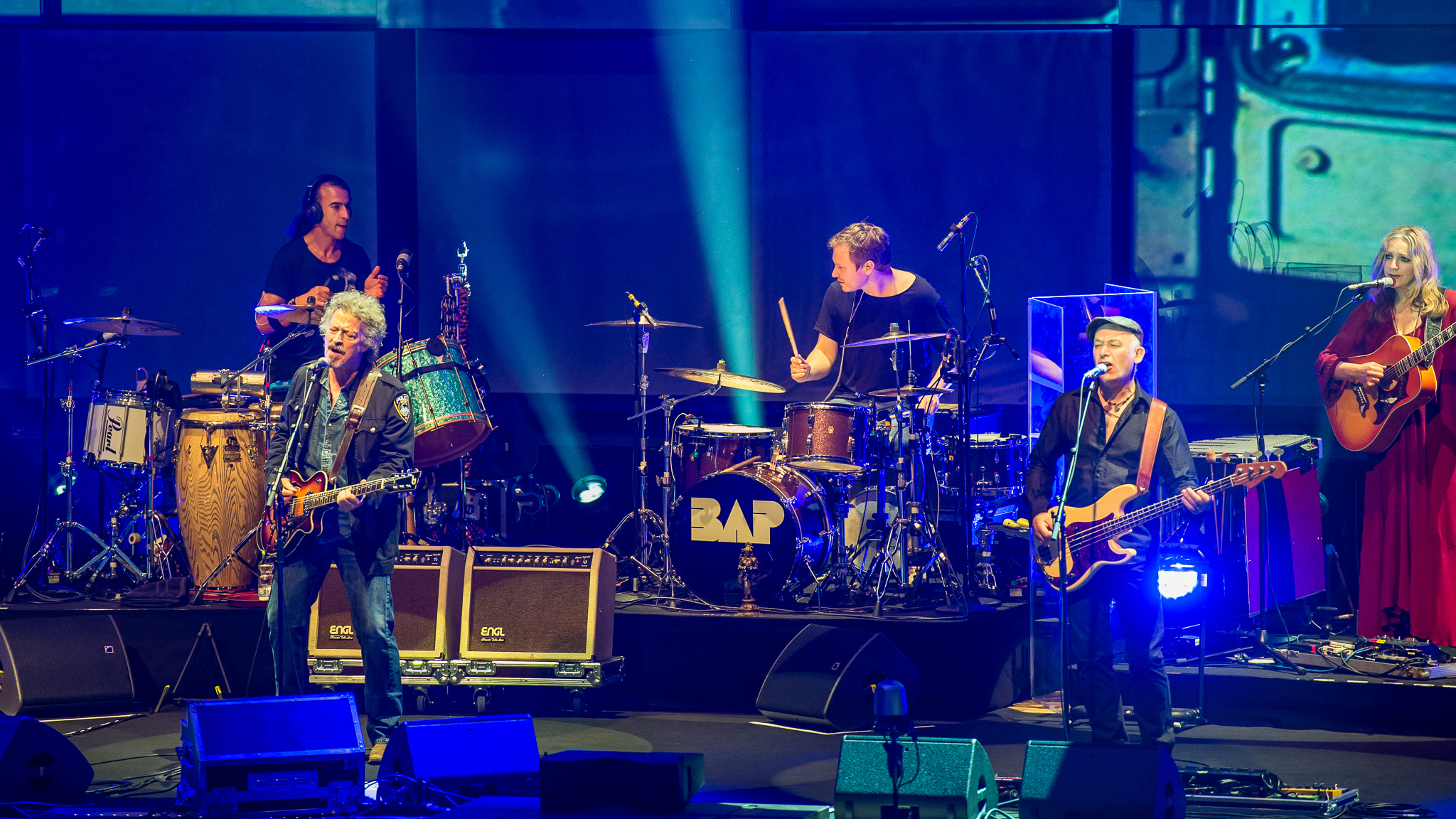 BAP,Concertbüro Franken,Konzert,Livekonzert,Livemusik,Meistersingerhalle,Musik,Niedeckens BAP